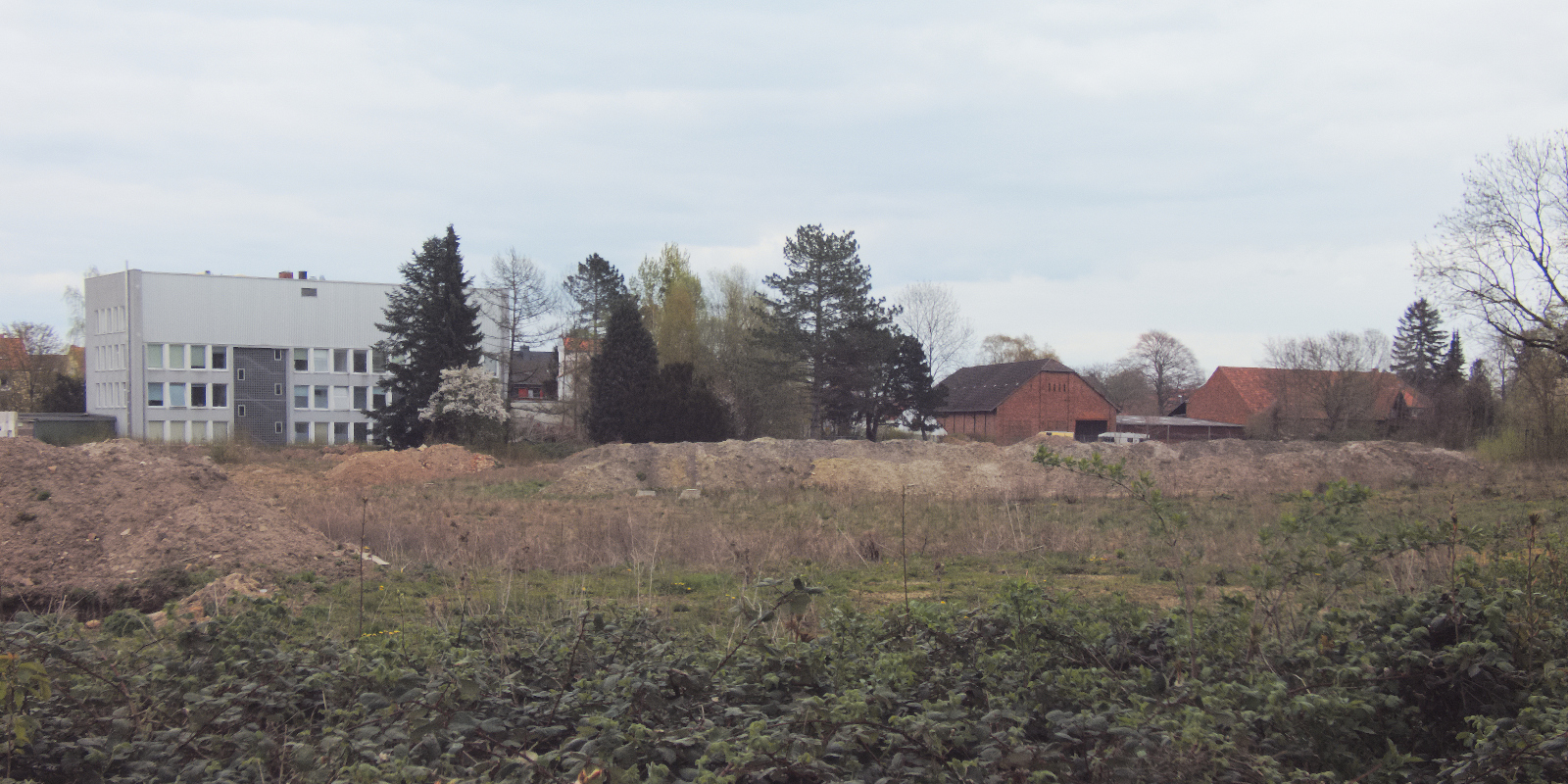 Blick über das sogenannte Vorwerk-Gelände in Gehrden